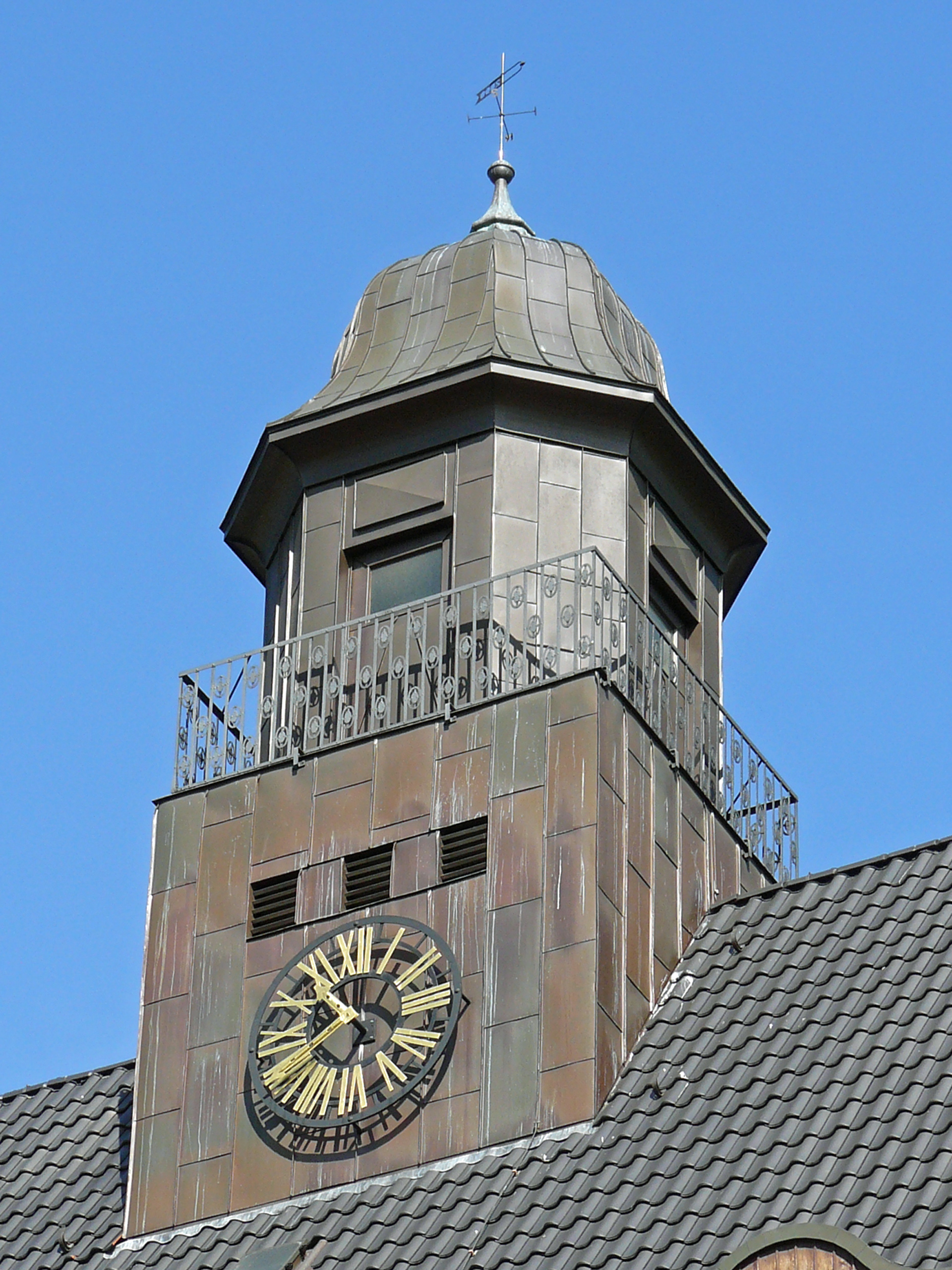 Turmuhr (Schuluhr) aus dem Jahr 1915 auf dem E. Strittmatter Gymnasium in Spremberg